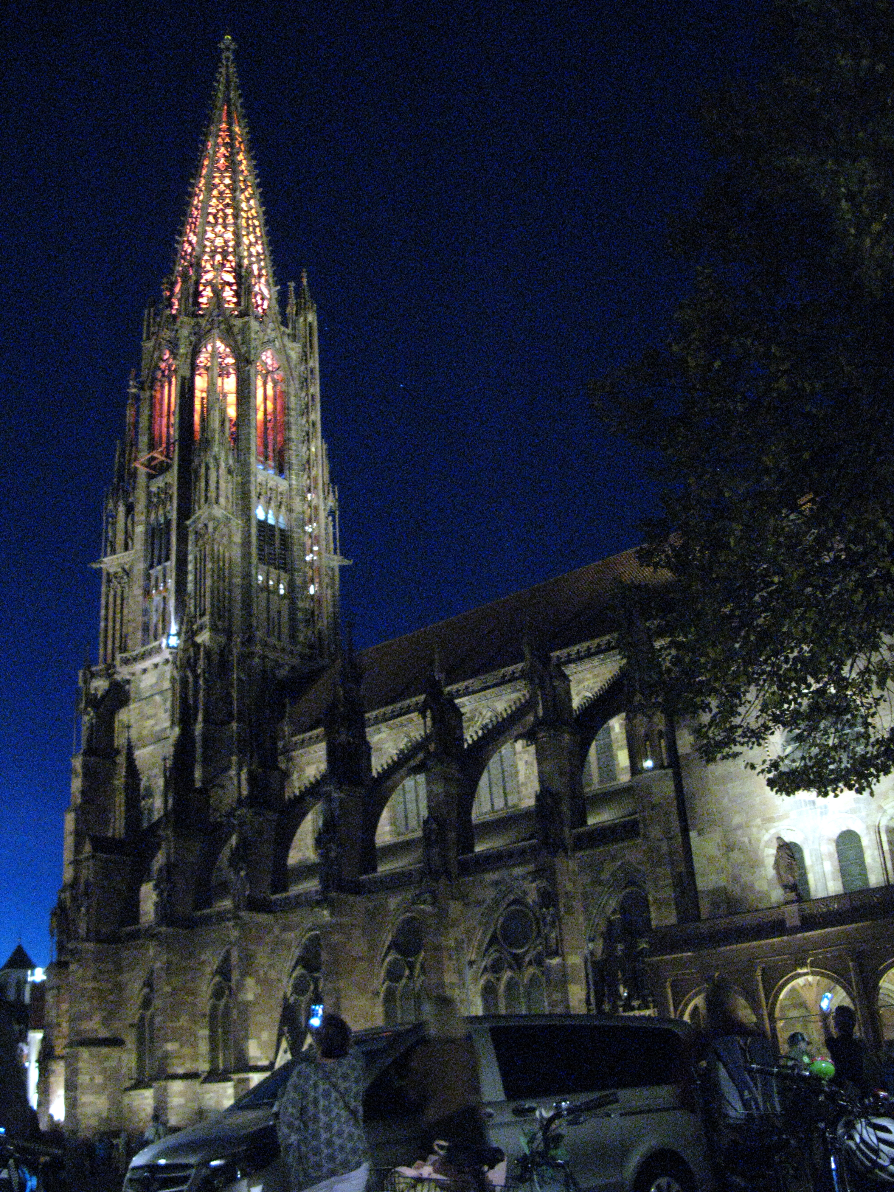 Turmfinale, Feier zum Abschluss der zwölfjährigen Renovierung des Münsterturms mit farbiger Beleuchtung der Turmhelmes